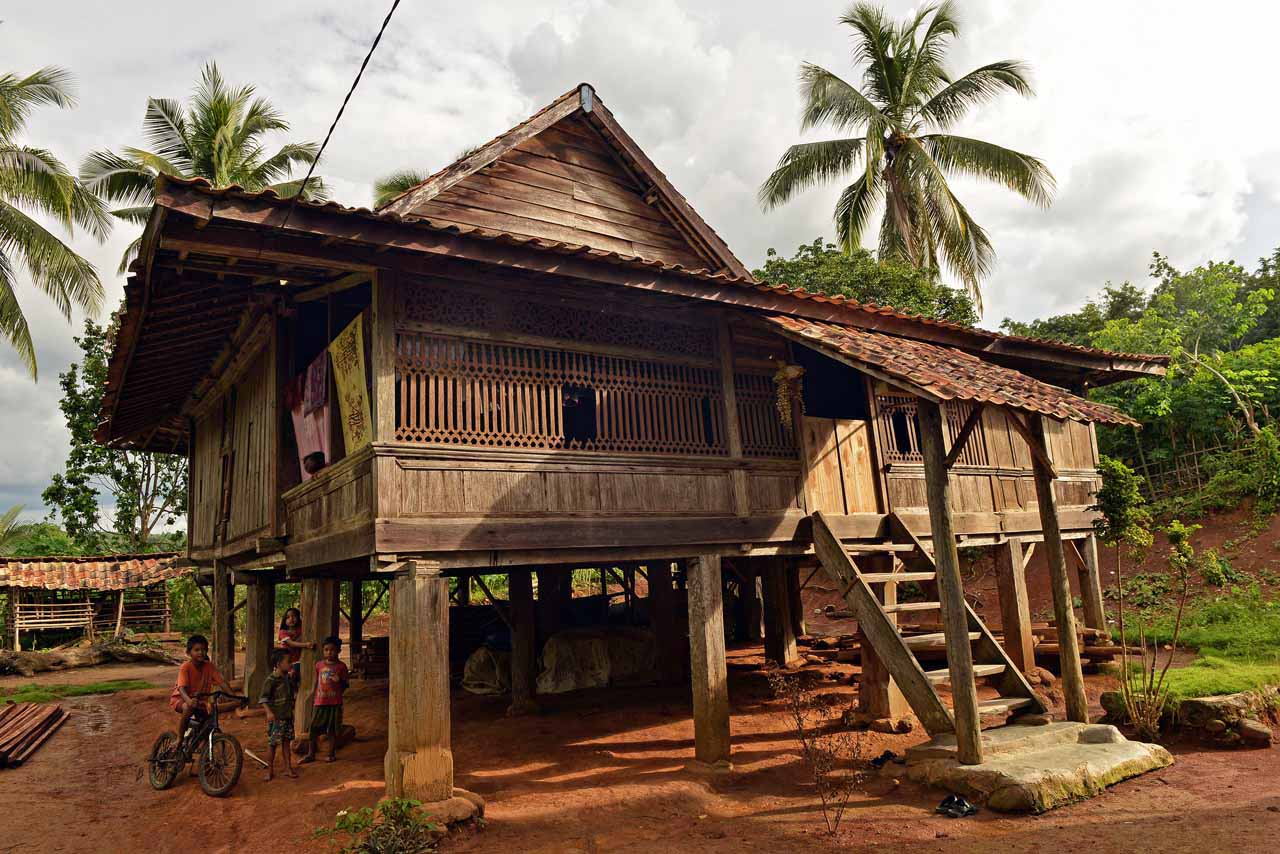 Rumah berusia ratusan tahun di Gedung Batin